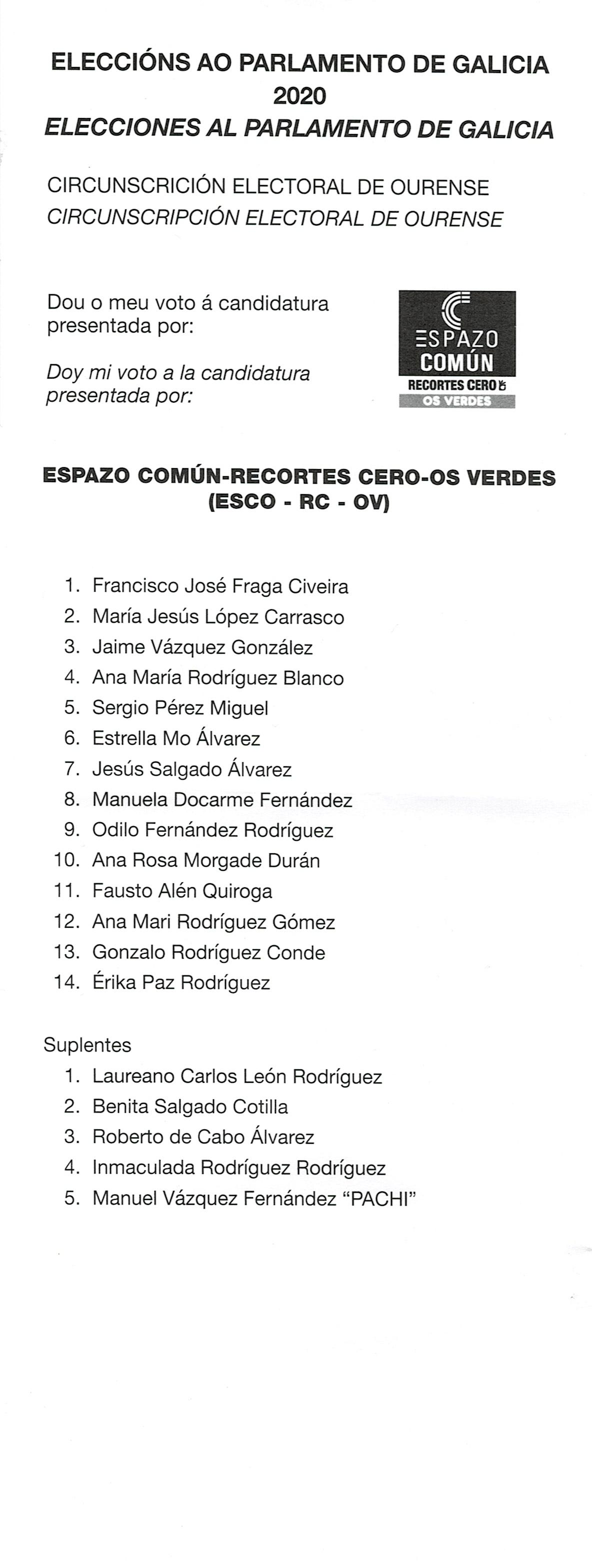 Papeletas electorais Eleccións ao Parlamento de Galicia 2020 pospostas circunscrición electoral de Ourense-Espazo Común